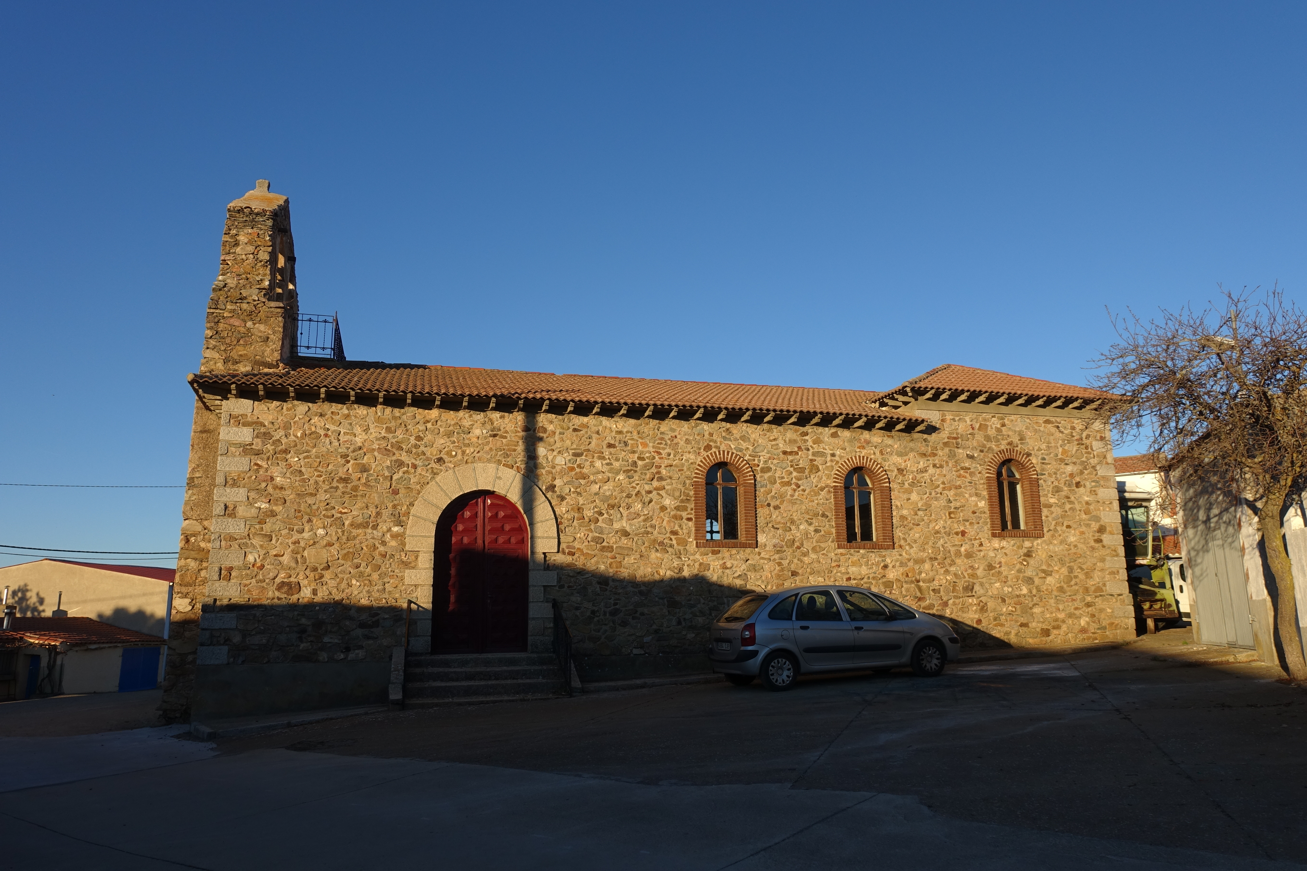 Iglesia de Santo Tomás Apóstol, Berrocal de Huebra (Salamanca, España).